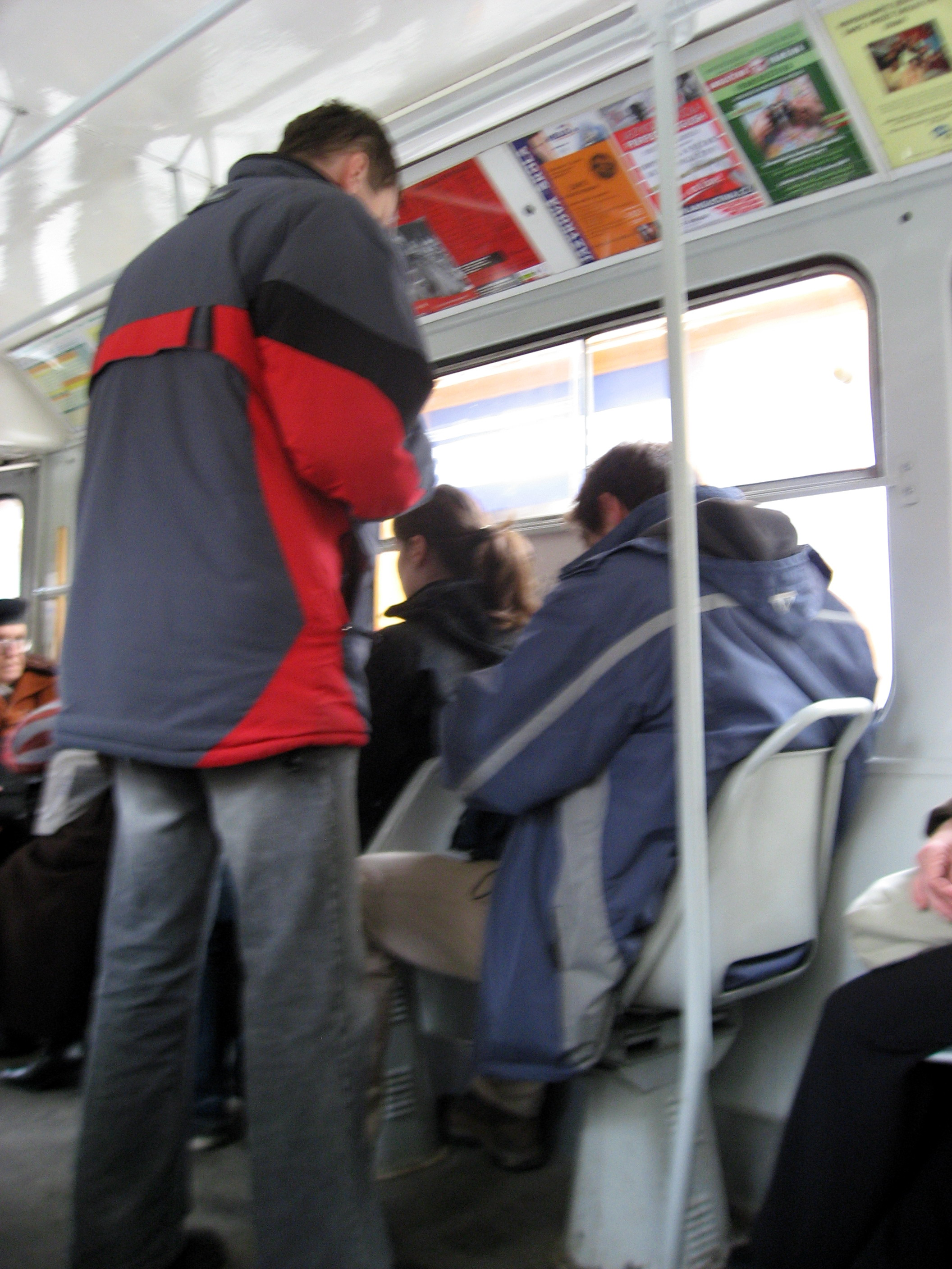 Revizor v Brně